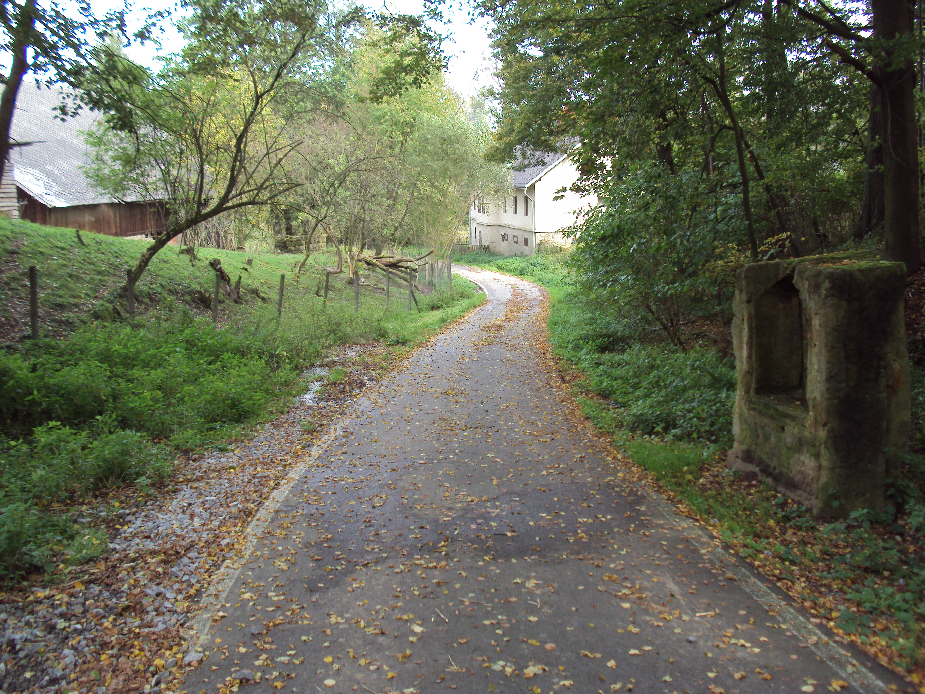 Cyklostezka Písečná, závěrečný sjezd do obce Písečná, cyklotrasa 3053